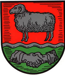 Farbe, Tier und Fluss deuten auf den Ortsnamen hin. Die Hände erinnern an den Zusammenschluss der früheren Gemeinden Everstorf und Avensen zur jetzigen Gemeinde Heidenau. Das Wellenband symbolisiert die Aue.